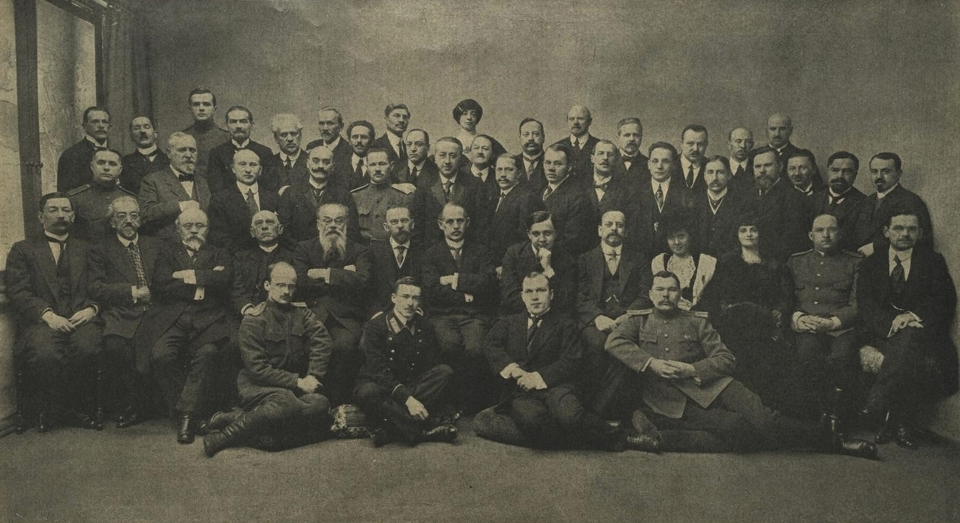 Группа сотрудников газеты «Новое Время». В центре первого ряда — М. А. Суворин. Налево от него: М. Н. Мазаев, Б. В. Гей, М. П. Хохлов, М. О. Меньшиков, Л. К. Попов, Ф. Ф. Борнгардт. Направо от М. А. Суворина: Б. А. Суворин, Н. И. Афанасьев, Н. Ю. Жуковская, В. А. Попова, д-р С. К. Андронов, С. П. Добрачев. Во втором ряду слева на право: Б. В. Юрлов, А. А. Плещеев, П. Р. Кук, К. Г. Алексеев, А. С. Резанов, Ю. Д. Беляев, Н. И. Жухин, И. Л. Солоневич, В. А. Николаи, Г. А. Симаков, Е. Е. Тевяшев, А. А. Борисов, А. И. Коростелев, К. С. Тычинкин, М. Н. Бялковский. В третьем ряду: Я. Я. Наумов, Л. Н. Афанасьев, С. С. Марк, Ю. О. Сосницкий, Н. Н. Вентцель, В. В. Розанов, Г. А. Магула, Е. А. Философов, И. Ф. Мануйлов, А. П. Богачев, С. К. Карастелева, К. Я. Шумлевич, Н. И. Вознесенский, Д. Н. Вергун, А. М. Ренников, А. А. Бурнакин. Внизу сидят: Н. С. Павловский, С. В. Карцев, А. П. Тупин, А. Н. Шаталов.